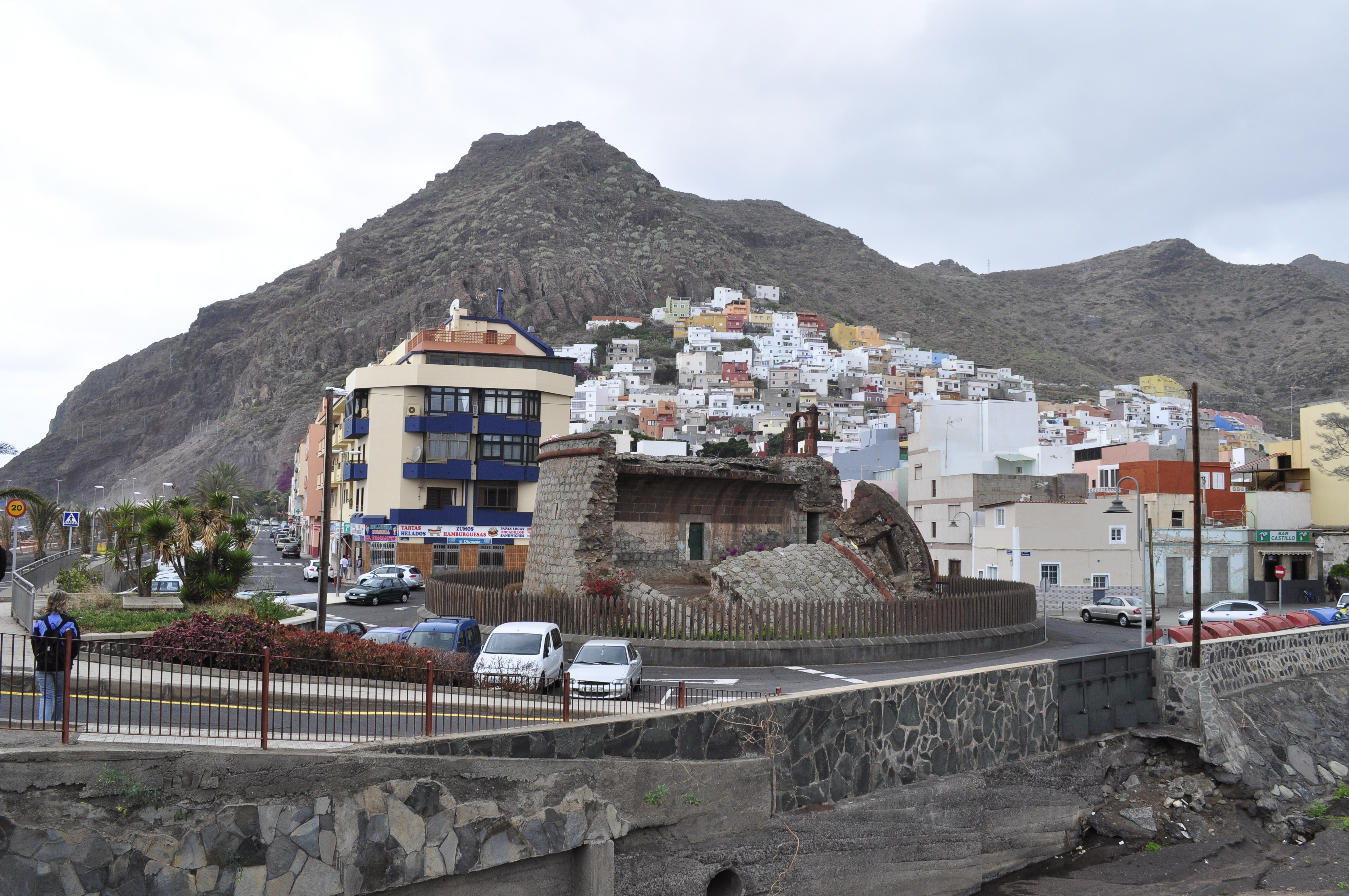 San Andrés (Teneriffa)